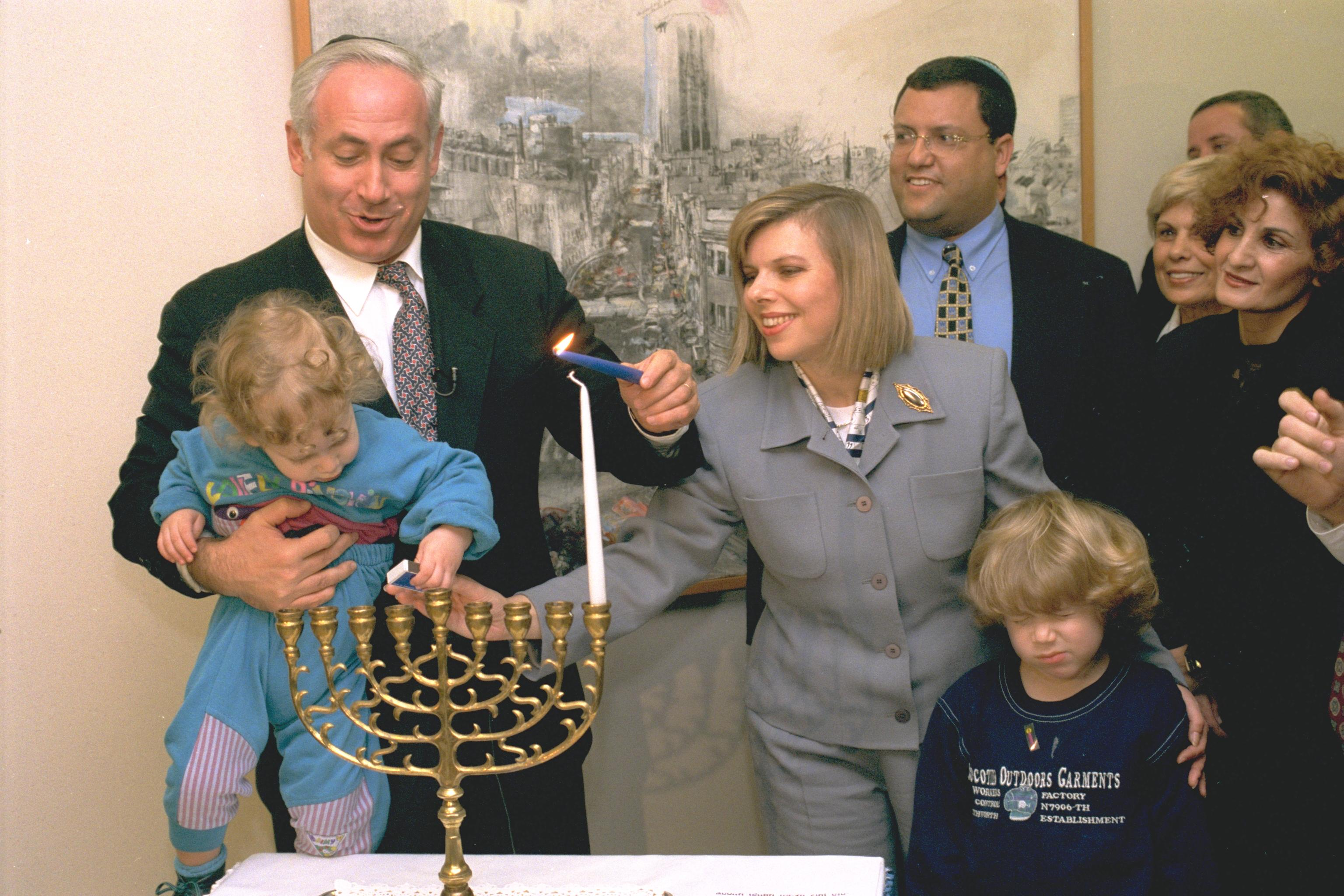 P.M. BENJAMIN NETANYAHU LIGHTING HANUKA CANDLES ON THE 1ST NIGHT IN THE P.M.'S OFFICE IN JERUSALEM WITH THE HELP OF HIS WIFE, SARA SONS, YAIR AND AVNER (05/12/1996). ראש הממשלה, בנימין נתניהו, מדליק נרות חנוכה במשרד ראש הממשלה עם אישתו, שרה וילדיו, יאיר ואבנר Photo: OHAYON AVI.